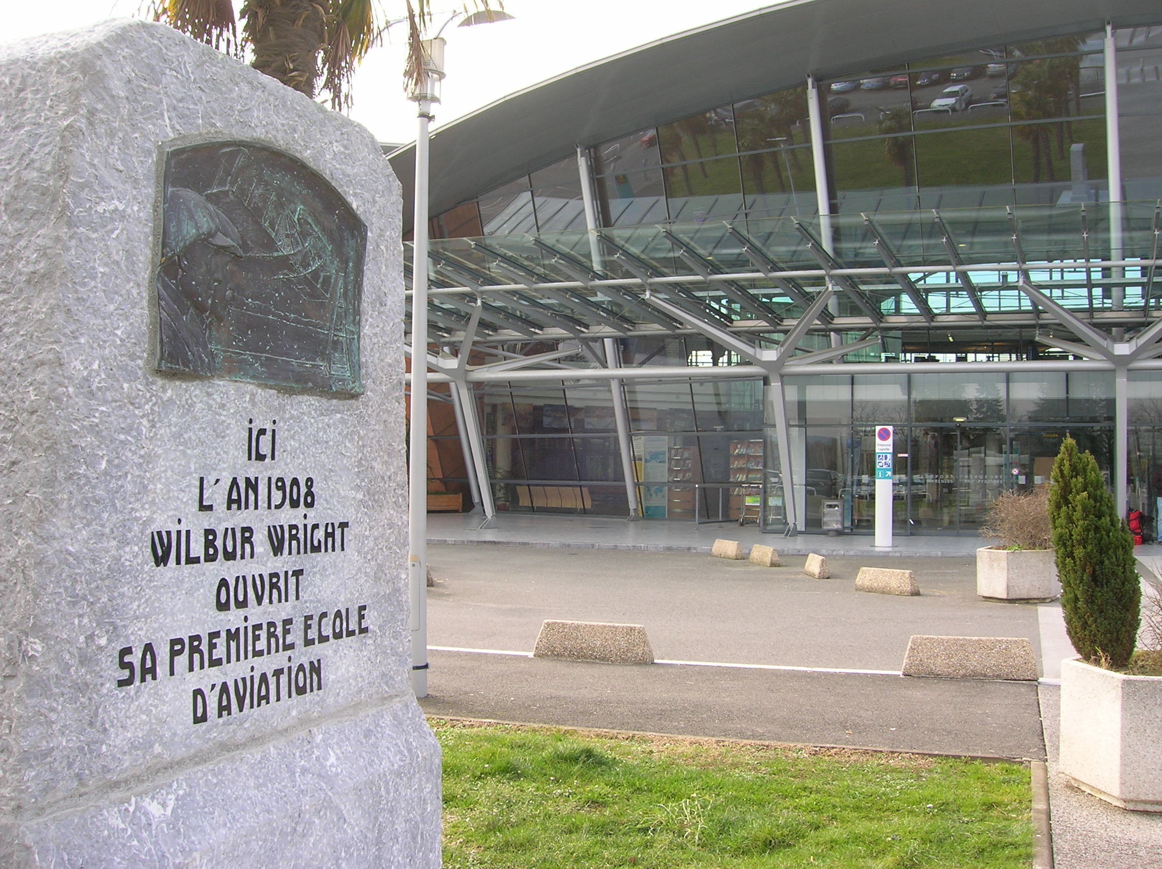 Stèle au nom de la première école au monde de pilotage, Aéroport de Pau, France